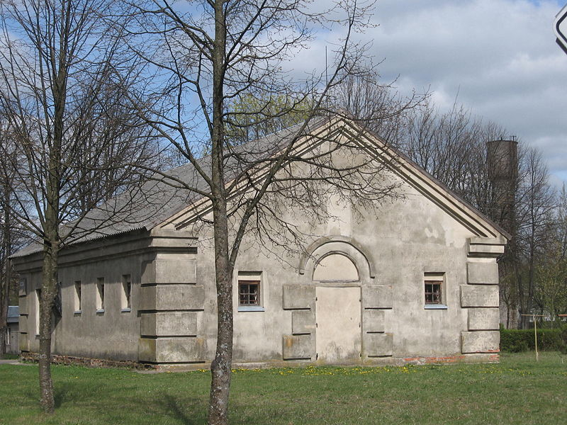 Macikai. Buves lageris